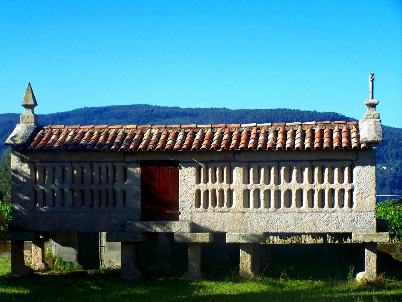 Hórreo de pedra.